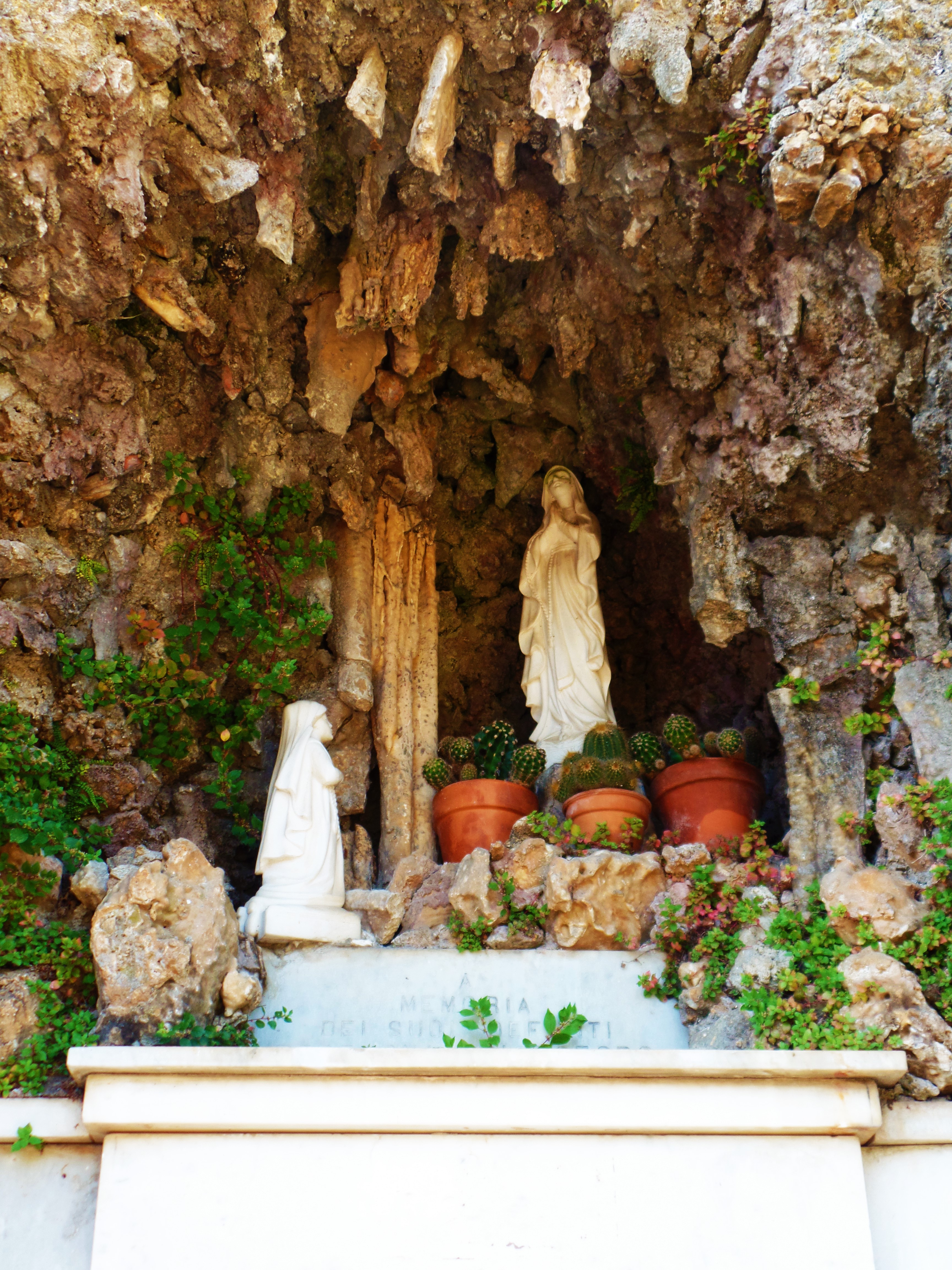 Una delle tante fontane presenti a Retignano, in Versilia. Qui c'è una figura religiosa al di sotto della quale si trova la fontana.